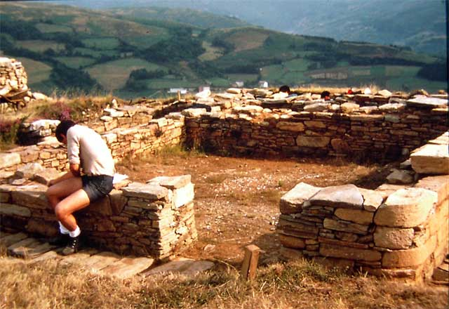 Excavaciones arqueológicas en el Castro de San Chuis (Pola de Allande, Asturias, España)